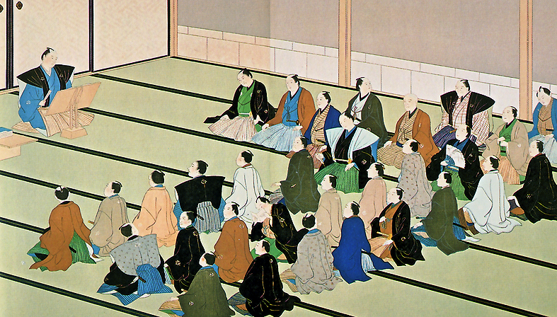 Чжусианская школа Юсимасэйдо. "Калейдоскоп Эдо". Токио:1991.